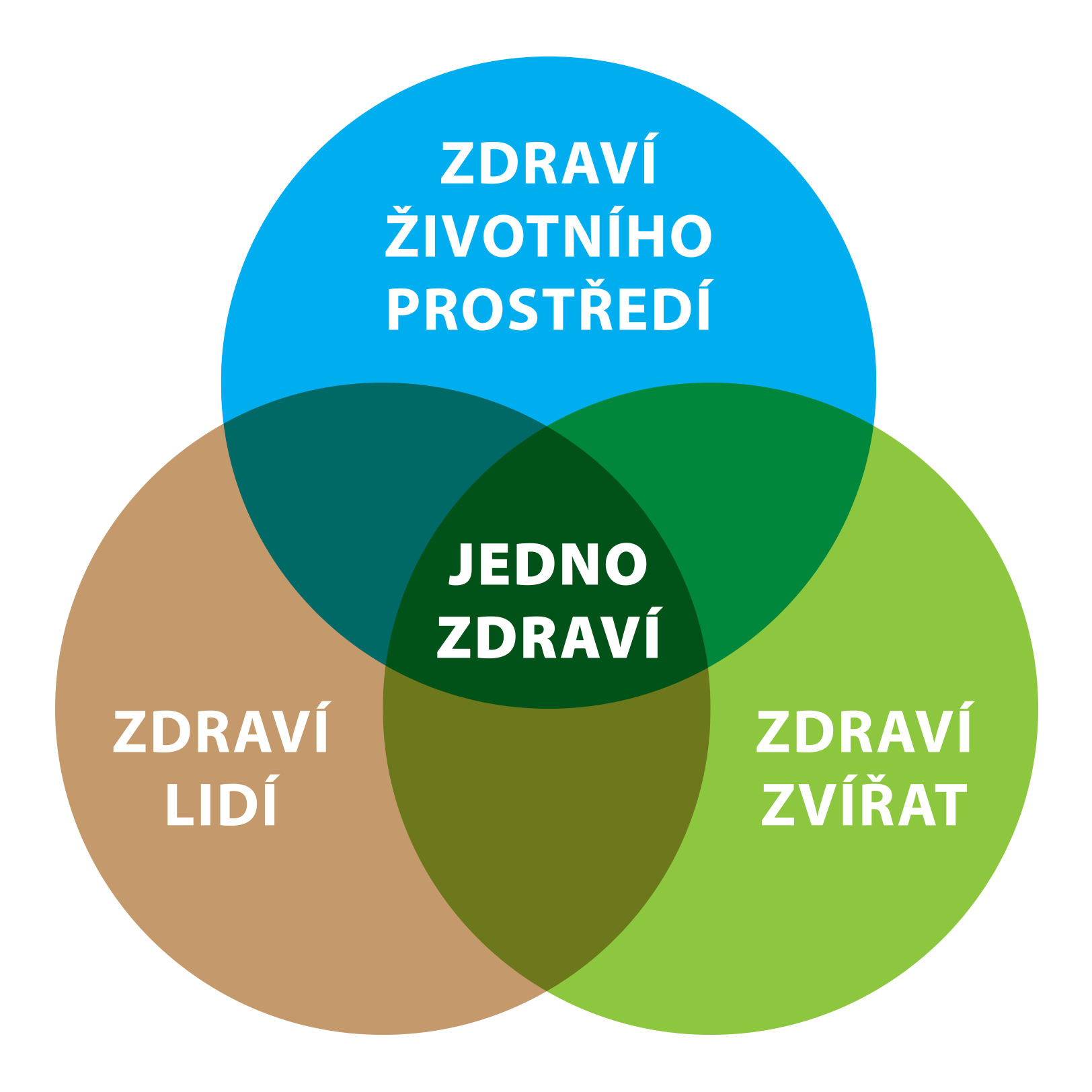 Model One Health (Jedno zdraví) je koncept mezinárodní interdisciplinární spolupráce pro dosažení optimálního zdraví člověka, zvířat a životního prostředí. Lidé, zvířata a životní prostředí společně tvoří jednu triádu zdraví. Společná triáda zdraví ukazuje, jak spolu zdraví lidí, zvířat a životního prostředí souvisí. Díky celosvětové spolupráci usnadňuje model Jedno zdraví rozvoj zdravotní péče ve 21. století. V případě, že je tento koncept správně nastaven a používán, může pomoci chránit a zachraňovat životy lidí, zvířat a životní prostředí pro současné i budoucí generace. Nezdravé životní prostředí či epidemie zoonóz souvisí s lidským zdravím a je třeba je řešit společně, což bude mít podle Světové banky i ekonomické výhody. Biologická bezpečnost je důležitá i pro EU. Rizika onemocnění snižuje správná hygiena, aktuální očkování a správné používání antibiotik u lidí i zvířat. Vzhledem k množství druhů zvířat vystupujících v roli rezervoárů pro různé infekce, je do určité míry zbytečné bojovat s těmito infekcemi u lidí, když zdroj nákazy zůstává. Řešením je co nejmenší kontakt lidí s přírodními ohnisky (divokými zvířaty) a redukce rezervoárů v podobě chovů a jatek hospodářských zvířat. Rostlinná strava může snížit počet zvířat v průmyslových velkochovech a omezit tak výskyt zoonotických patogenů.